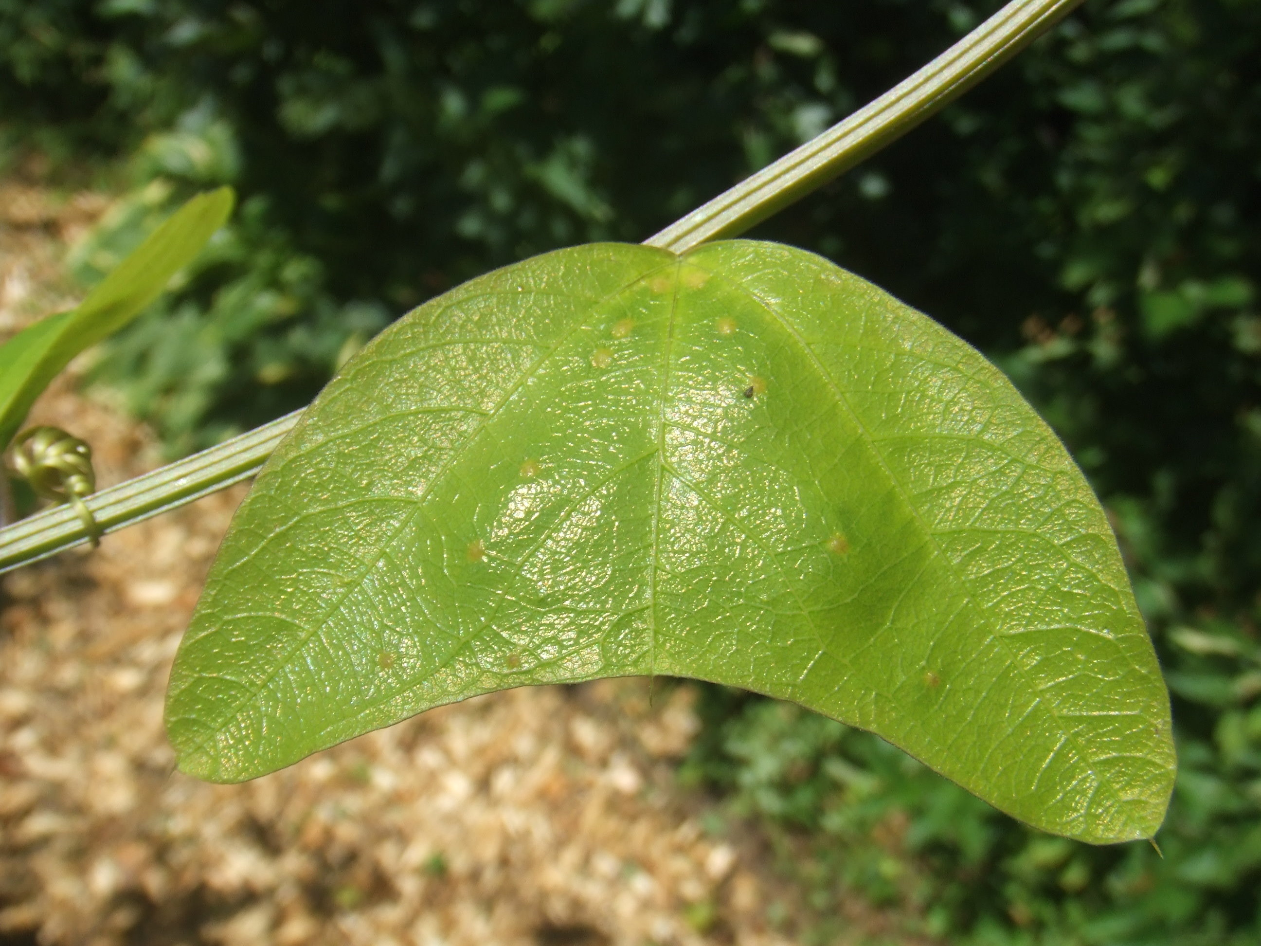 Passiflora biflora, Passiflorahoeve in Harskamp, Nederland